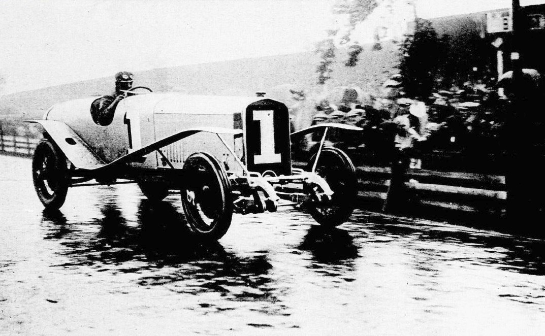 Paul Bablot vainqueur de la Coupe Georges Boillot en 1922, sur Hispano-Suiza H6 4,5 L. - Le Monde Illustré du 5 août 1922, p.134